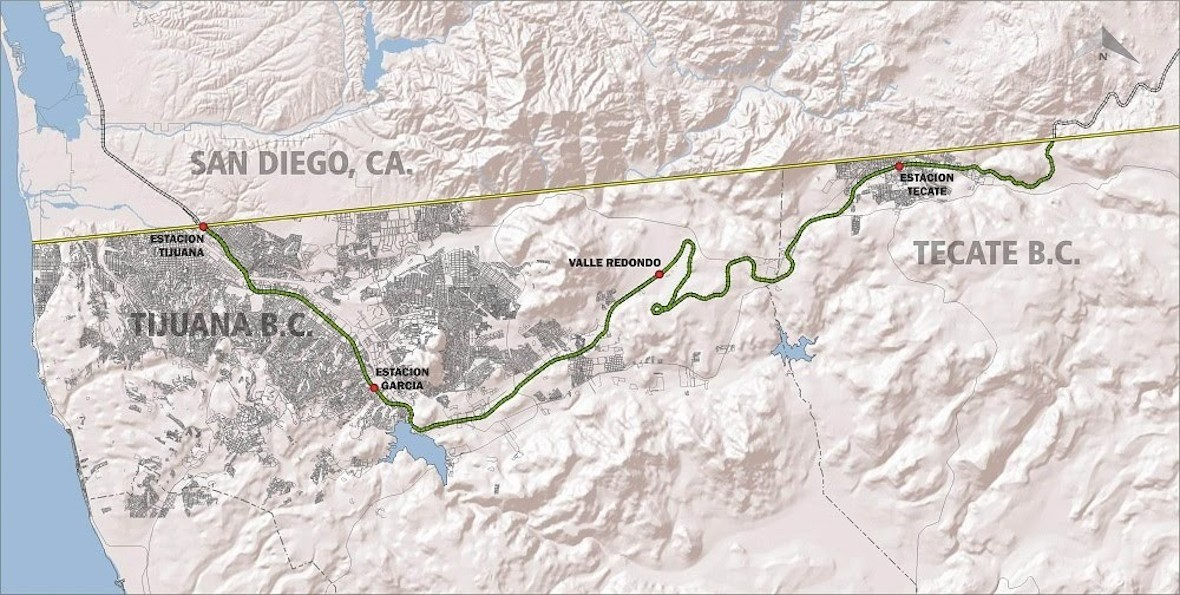 Nuestras estaciones